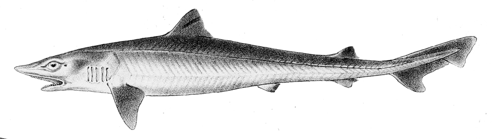 Galeorhinus galeus